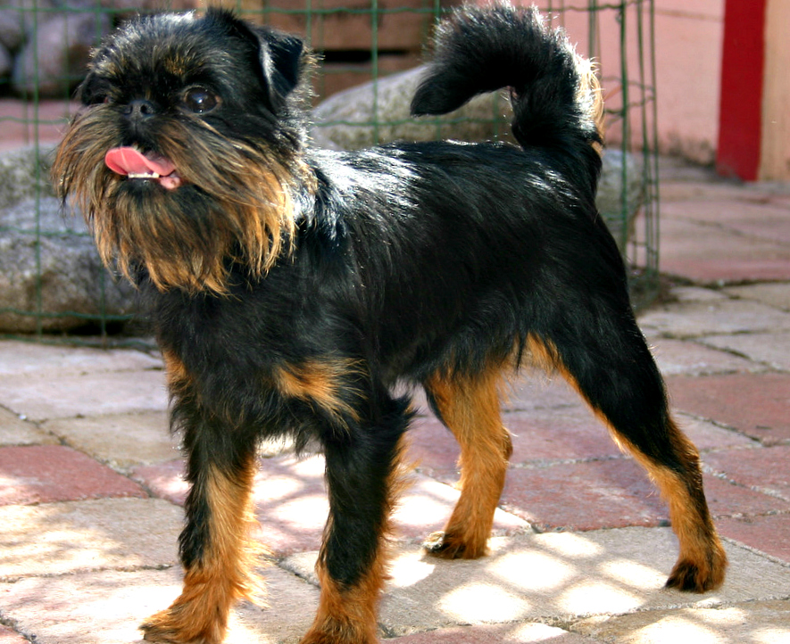 Griffon Belge dog